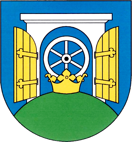 Znak Stráže nad Nisou pževzatý z oficiálních stránek obce (